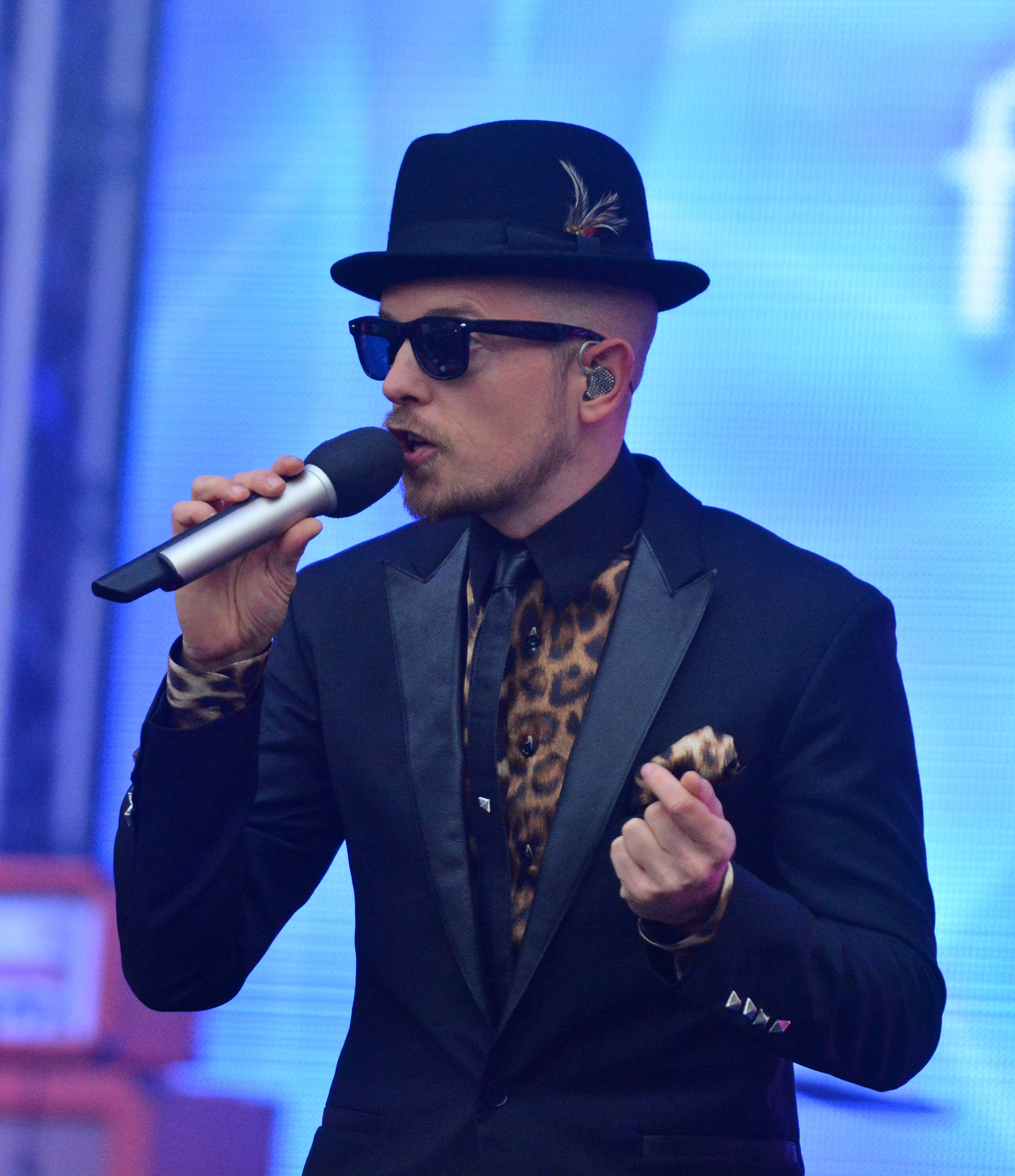 Jan Delay bei der ESC-Party auf der Hamburger Reeperbahn 2014 am 10. Mai 2014